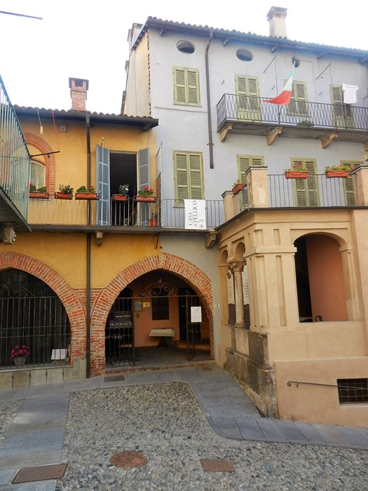 Saluzzo - Casa di Silvio Pellico